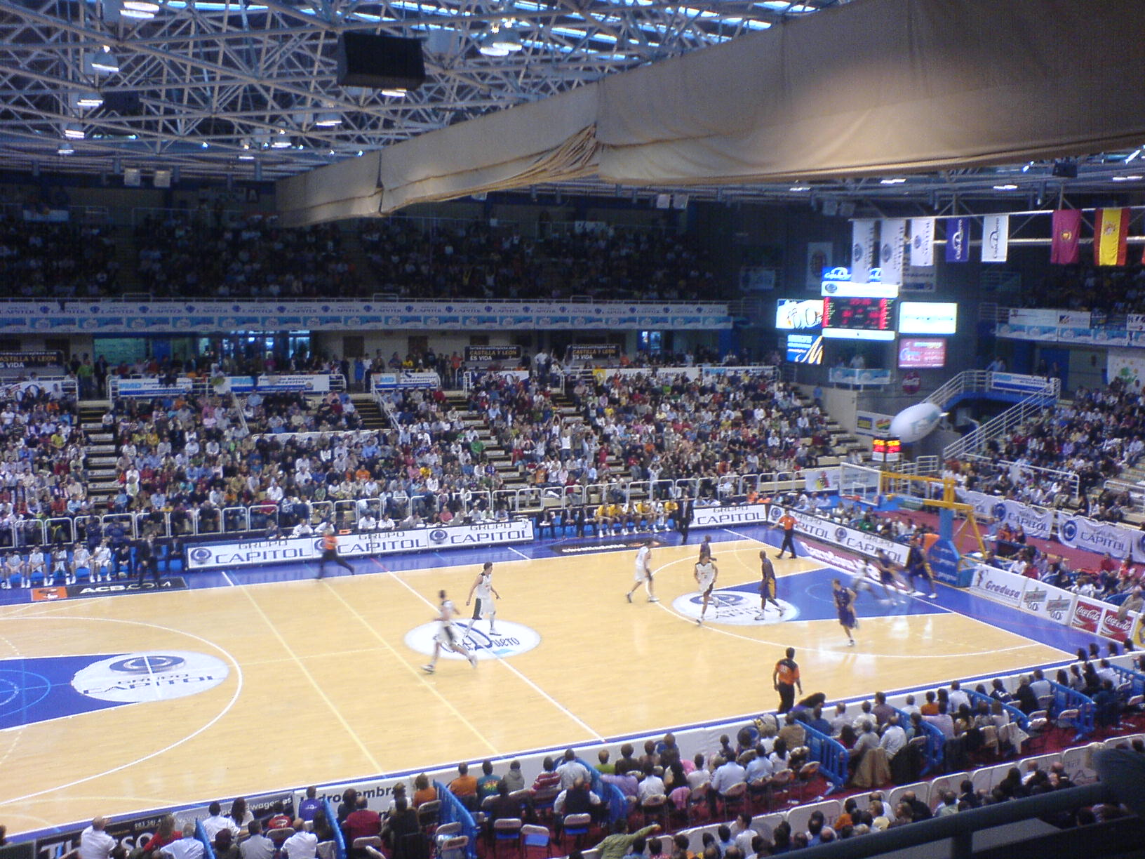 Partido entre el Grupo Capitol Valladolid y el Caja San Fernando de Sevilla